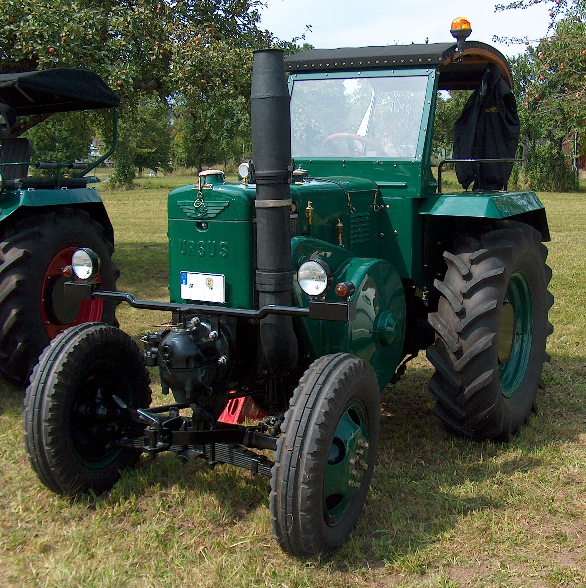 URSUS C-45, Baujahr 1949, 10338 ccm, 45 PS.